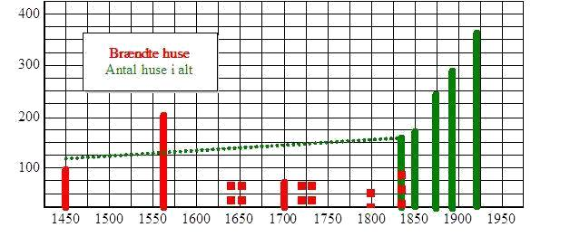 Graf med årstal for og størrelsen af bybrande samt det totale antal af huse i Nysted.